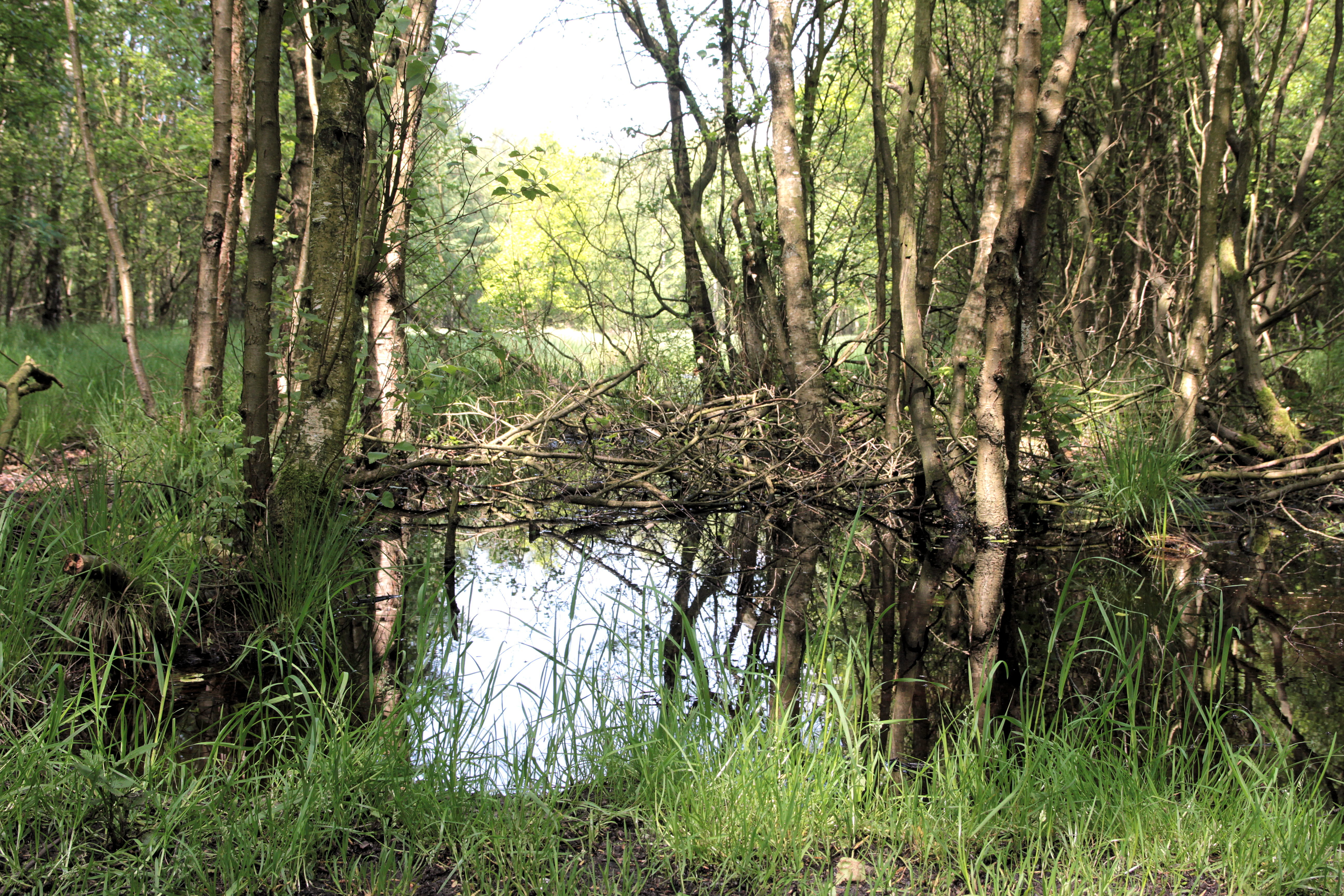 Naturschutzgebiet „Düllhamm“ in Bremerhaven nach dem Mairegen